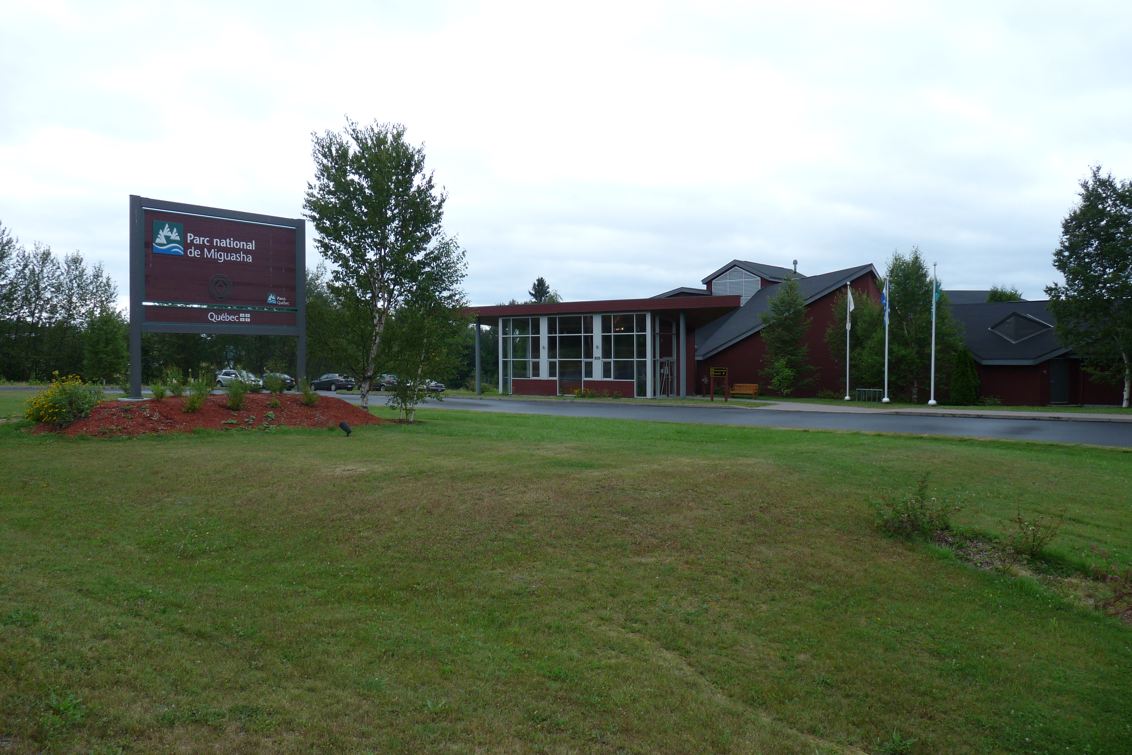 Bâtiment principal du parc national de Miguasha (Québec).